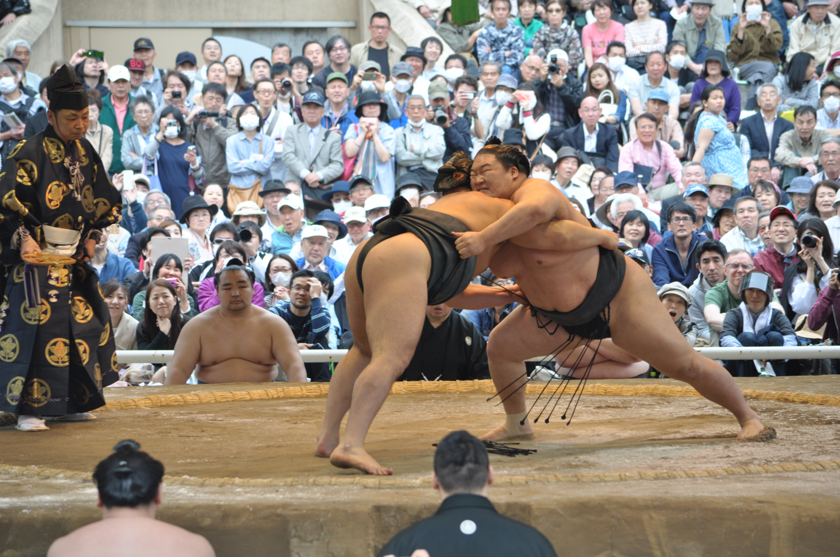 豪栄道 豪太郎